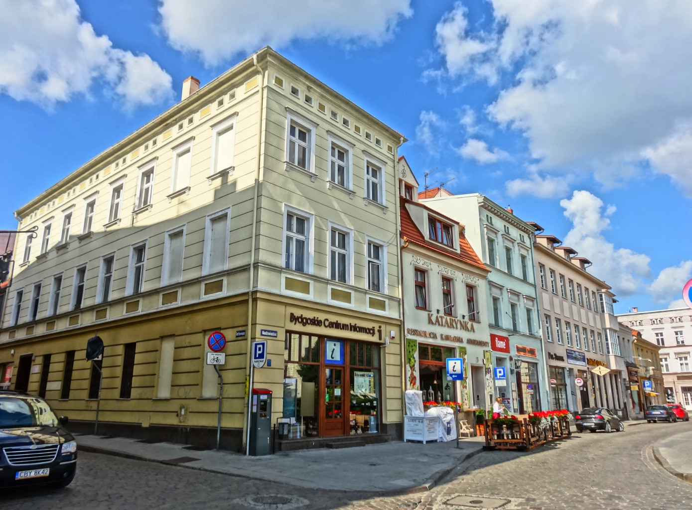 Ulica Niedźwiedzia w Bydgoszczy (Boczna od Starego Rynku)